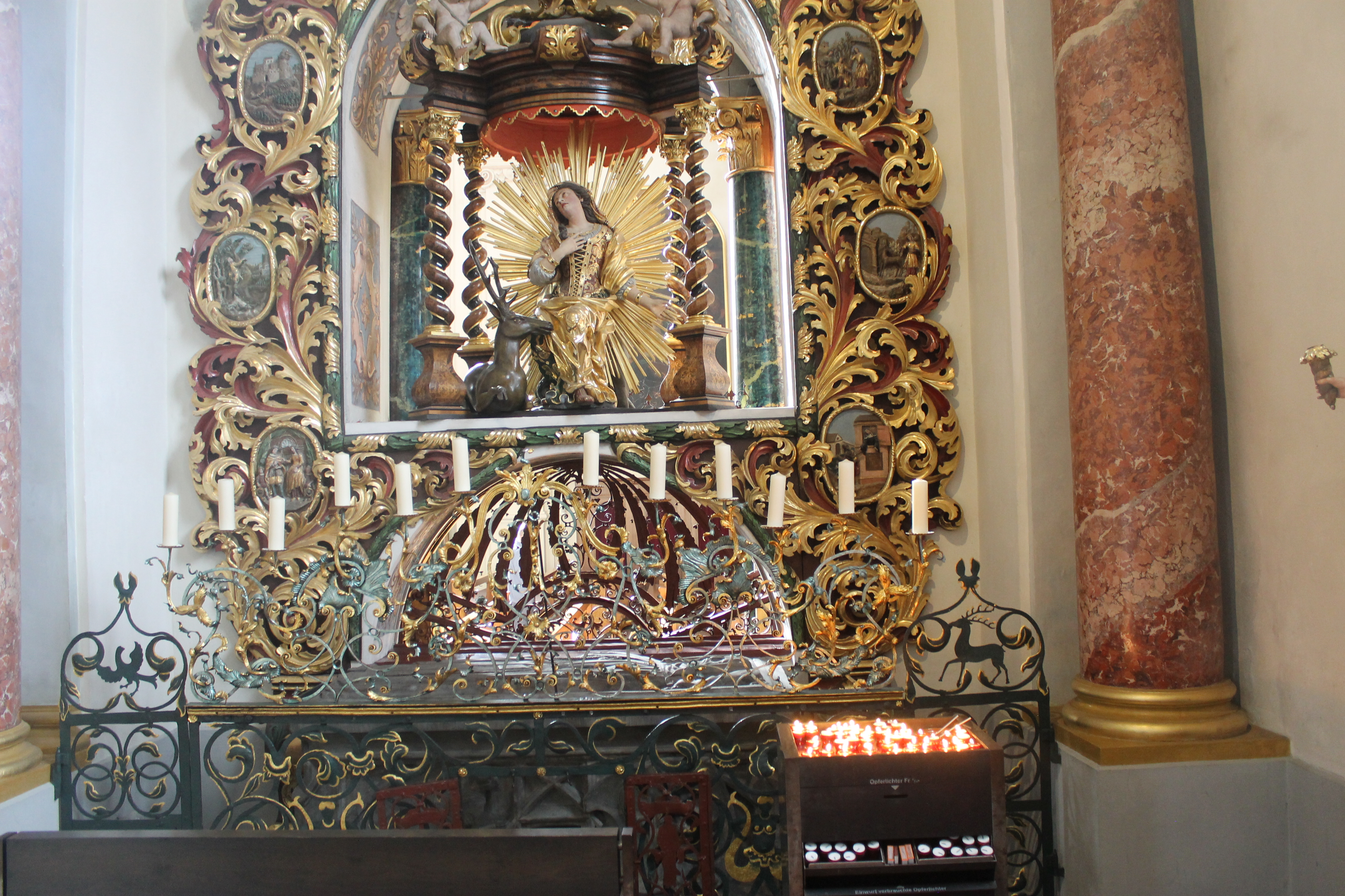 Altar und Sarkophag der Heiligen Idda von Toggenburg